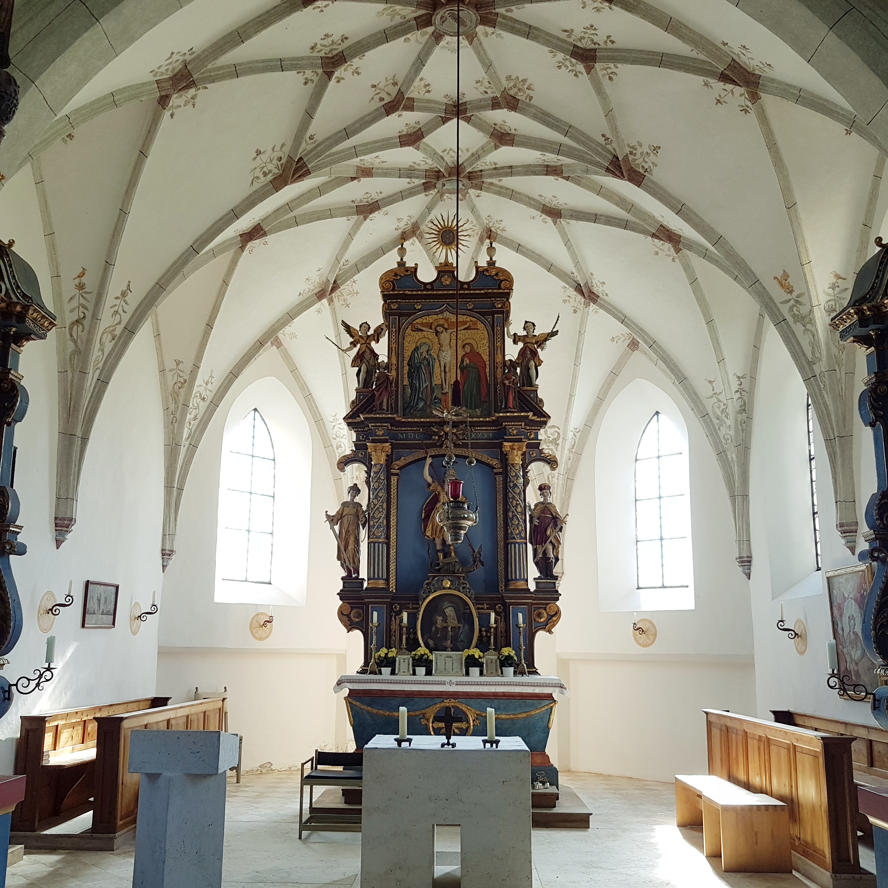 St. Georg (Georgenried), Chor mit Hochaltar